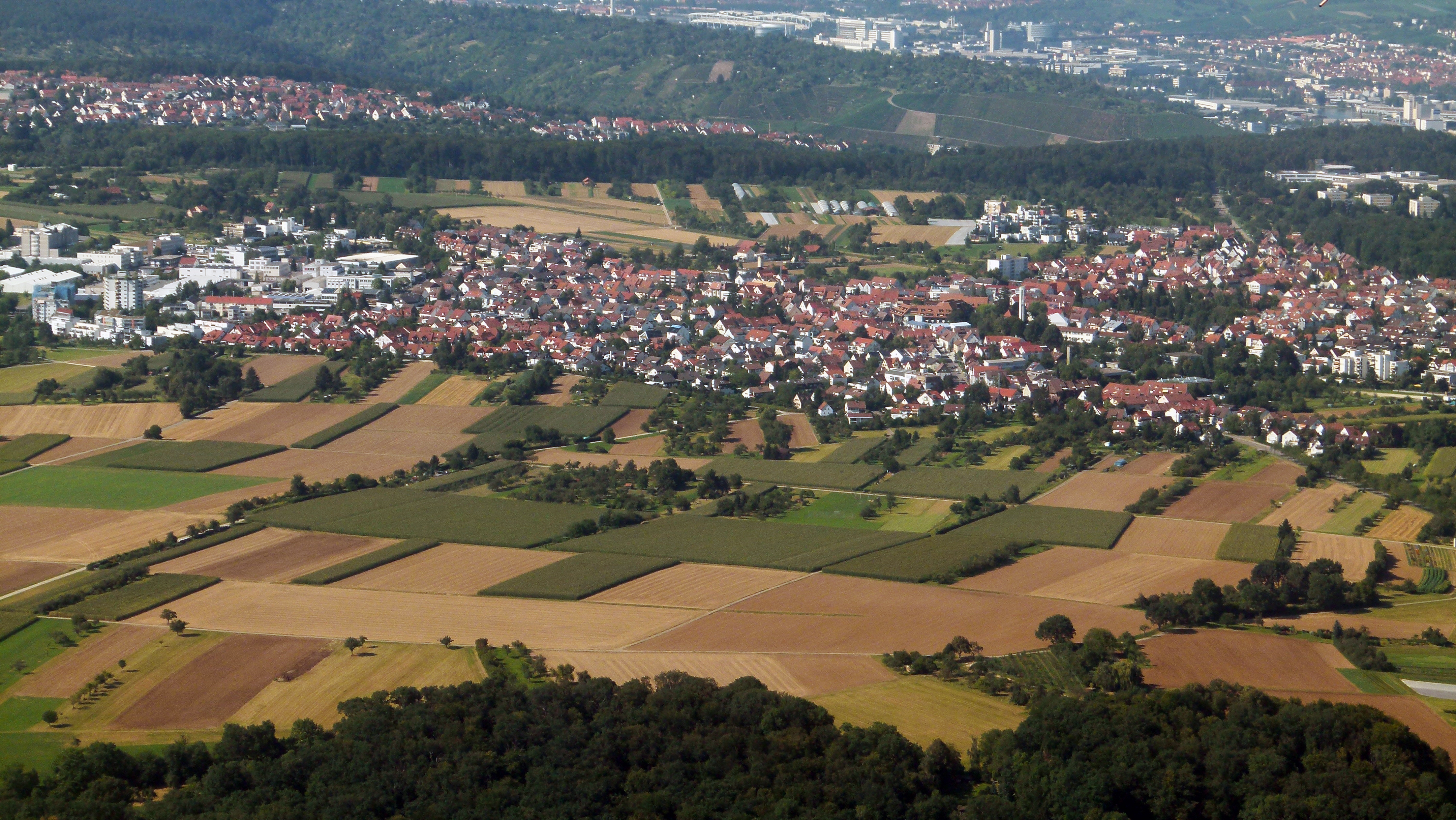 Luftbildaufnahme von Ostfildern